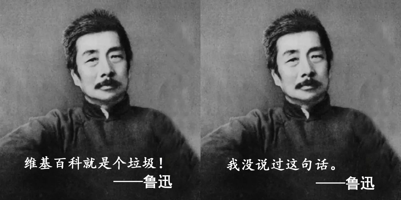 鲁迅表情包示例